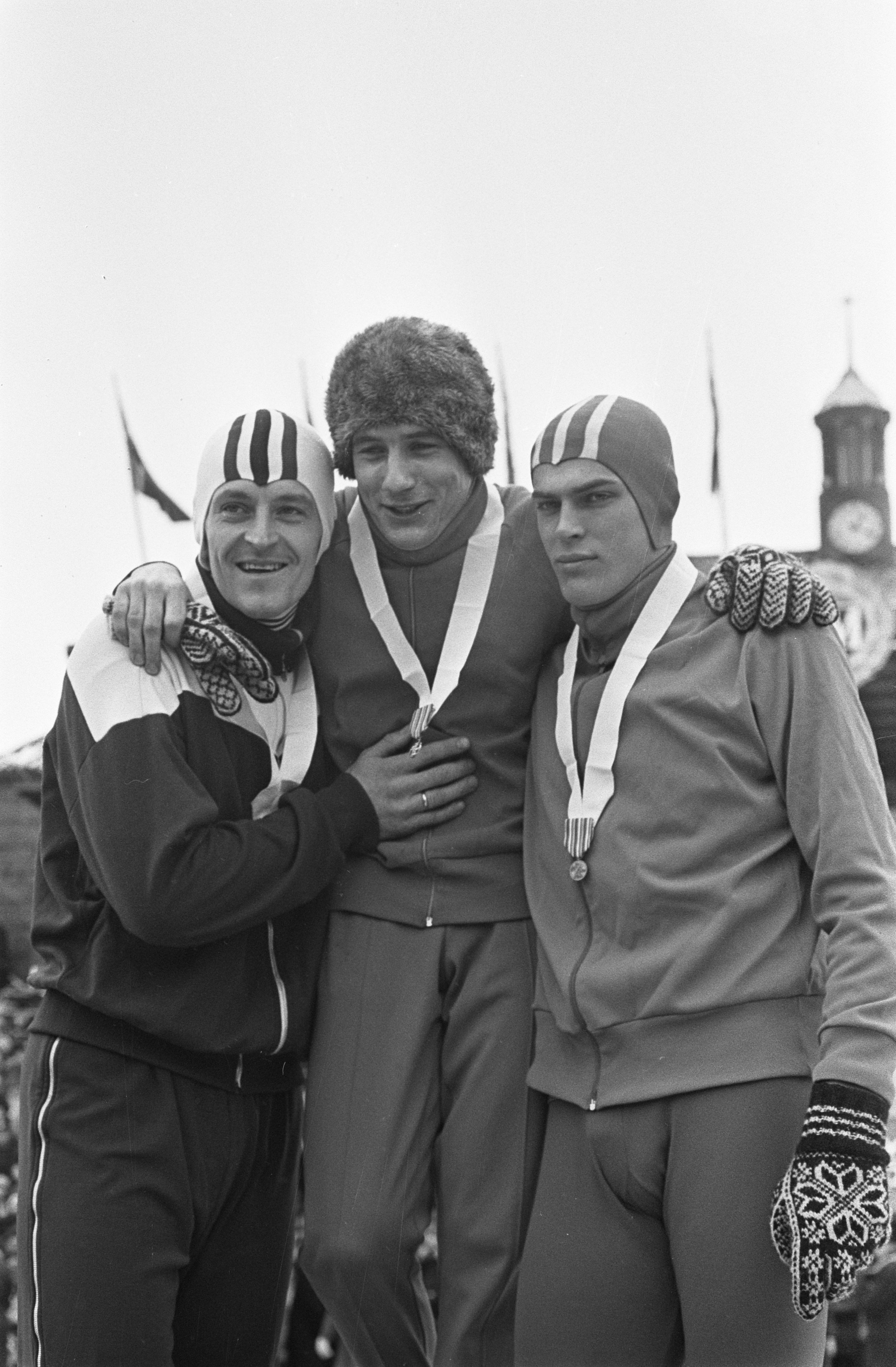 Collectie / Archief : Fotocollectie Anefo Reportage / Serie : [ onbekend ] Beschrijving : Wereldkampioenschappen schaatsen in Oslo, op podium 5000 meter v.l.n.r Maier (2), Verkerk (1), Schenk(2) Datum : 11 februari 1967 Locatie : Noorwegen, Oslo Trefwoorden : podia, schaatsen, sport Persoonsnaam : Maier, Fred Anton, Schenk, Ard, Verkerk, Kees Fotograaf : Kroon, Ron / Anefo Auteursrechthebbende : Nationaal Archief Materiaalsoort : Negatief (zwart/wit) Nummer archiefinventaris : bekijk toegang 2.24.01.05 Bestanddeelnummer : 920-0666